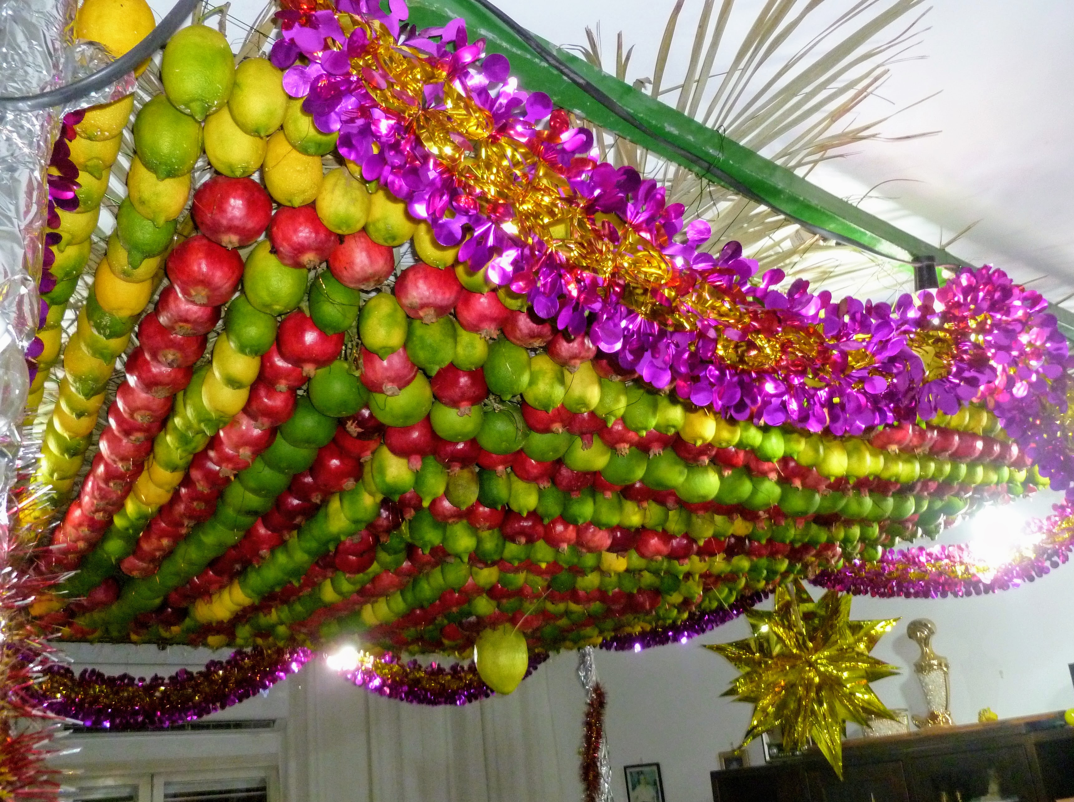 סוכה בתוך בית בשכונה השומרונית בחולון הסכך